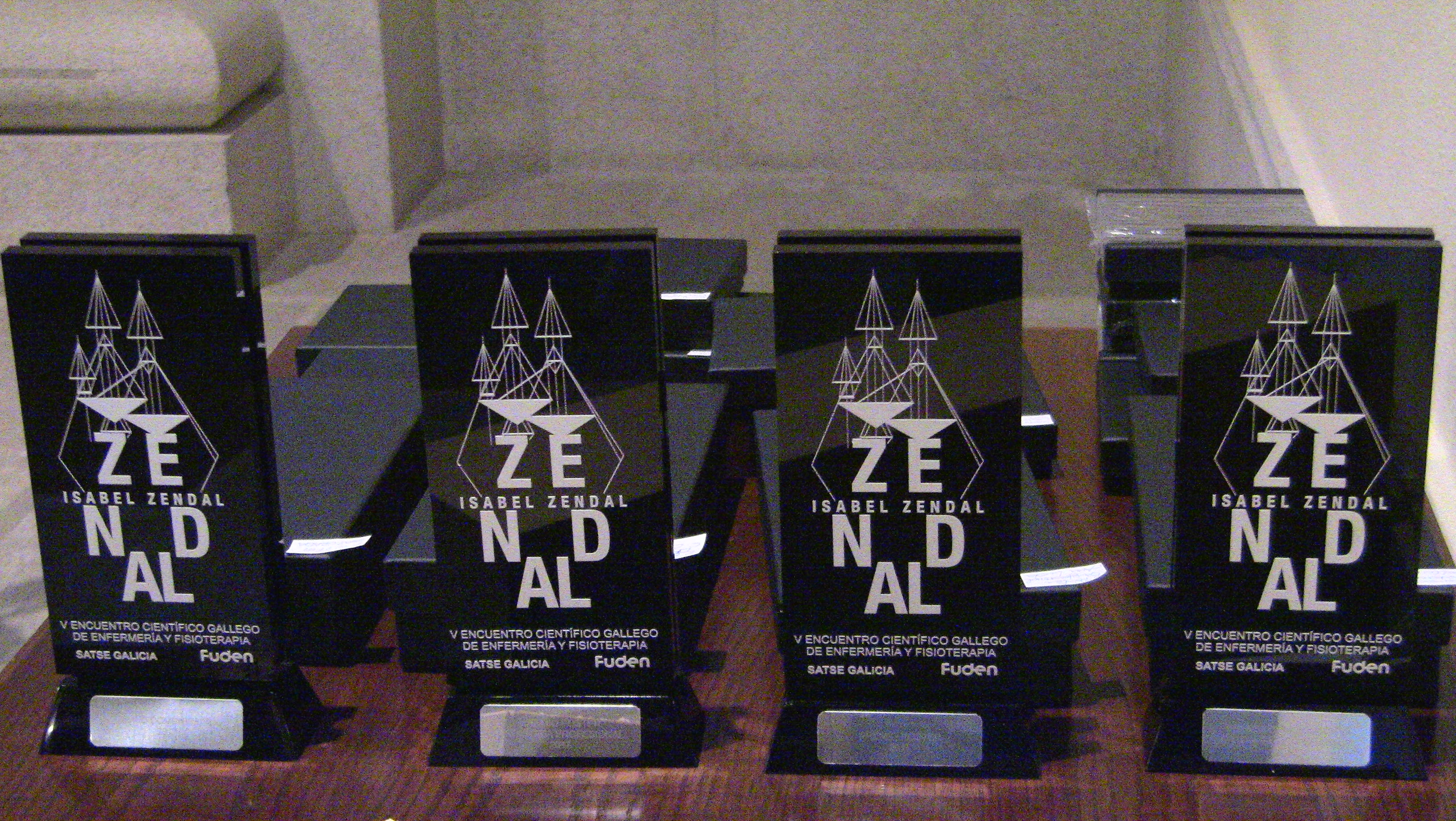 El Sindicato de Enfermería SATSE Galicia hace entrega en 2017, por primera vez, de los premios Isabel Zendal en el V Encuentro Científico Gallego de Enfermería y Fisioterapia.